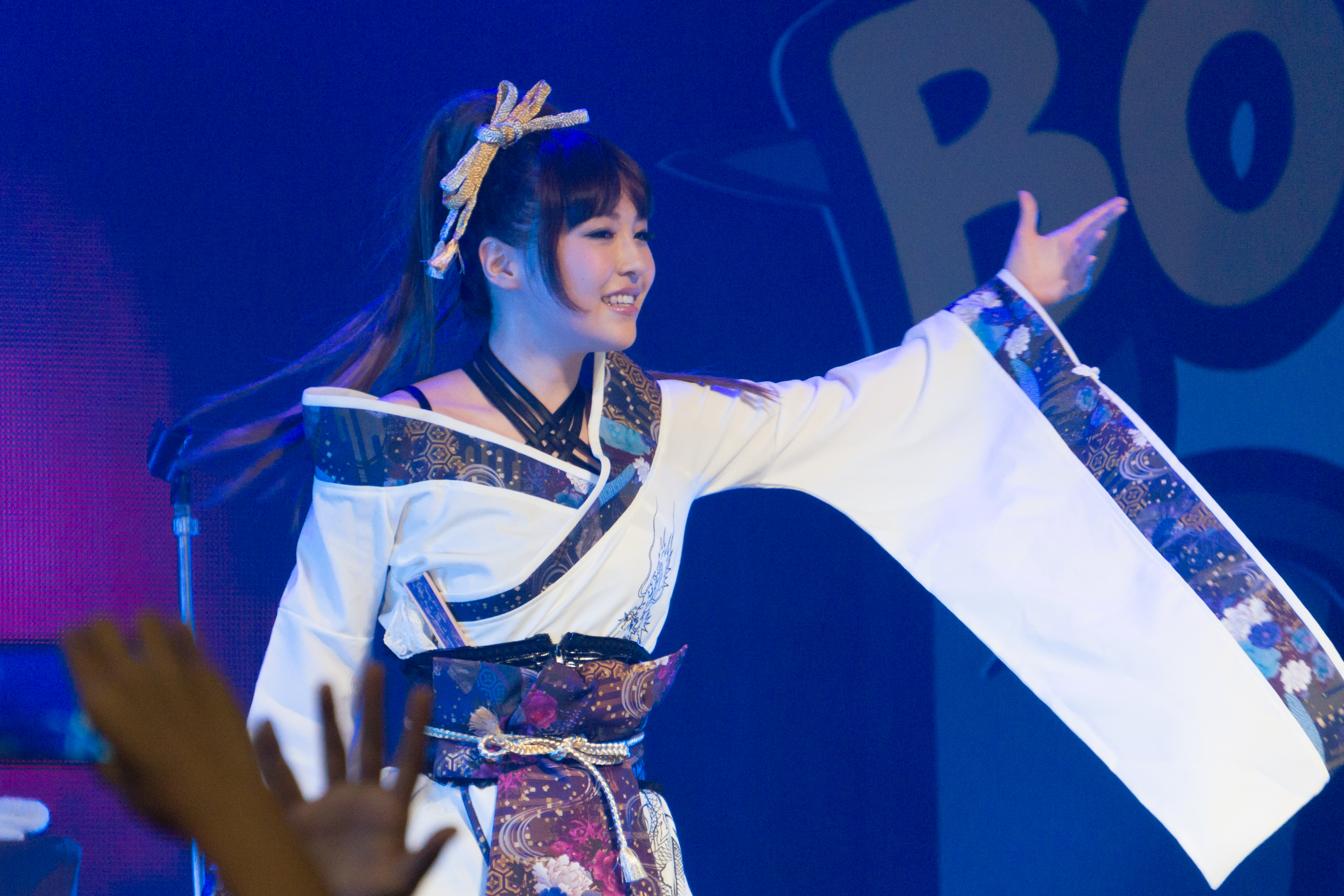 Maon Kurosaki